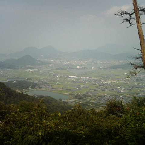 七宝山から見た三豊平野 - 日本国香川県三豊市